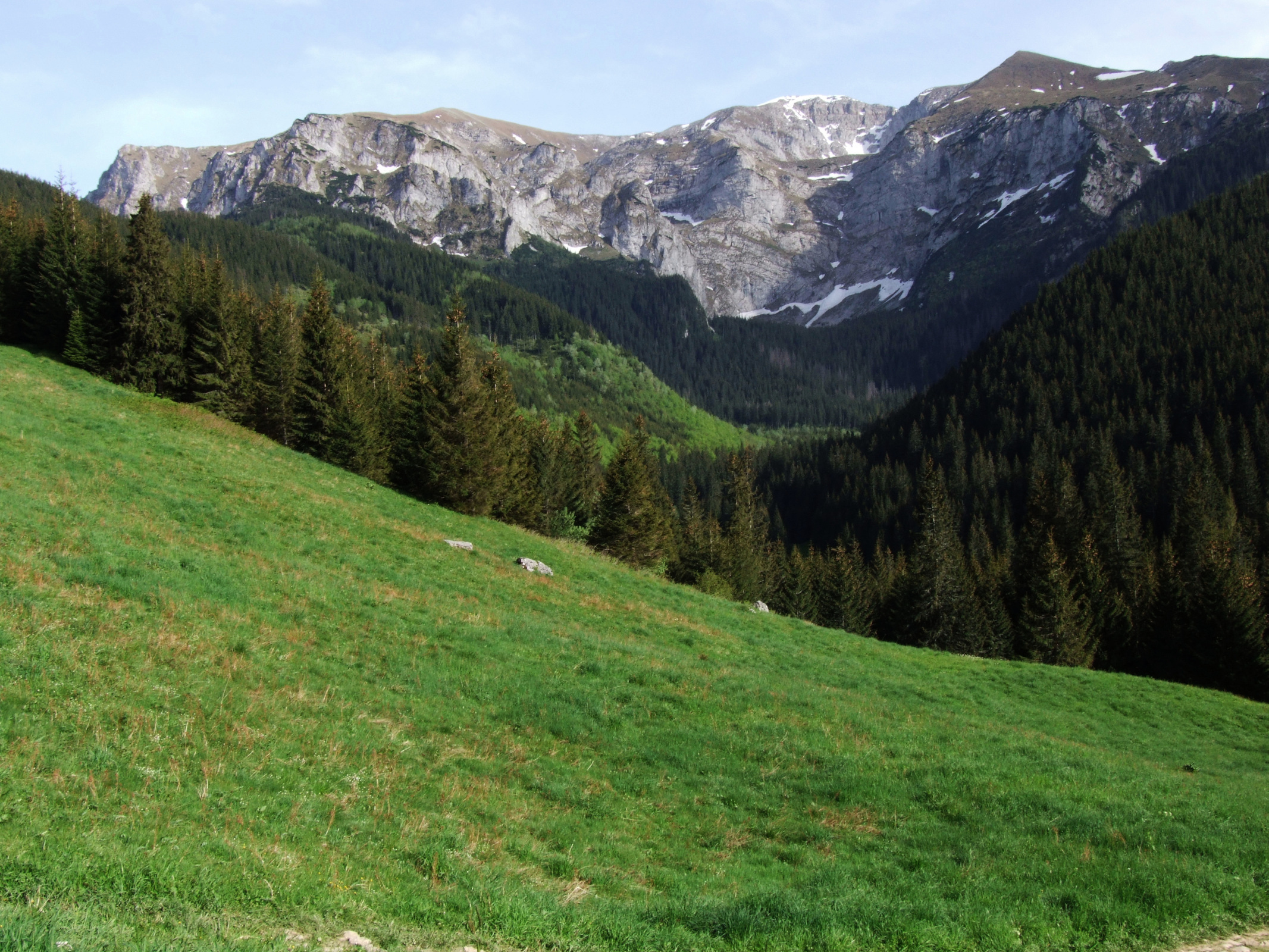 Dolina Miętusia (Tatra Mountains)